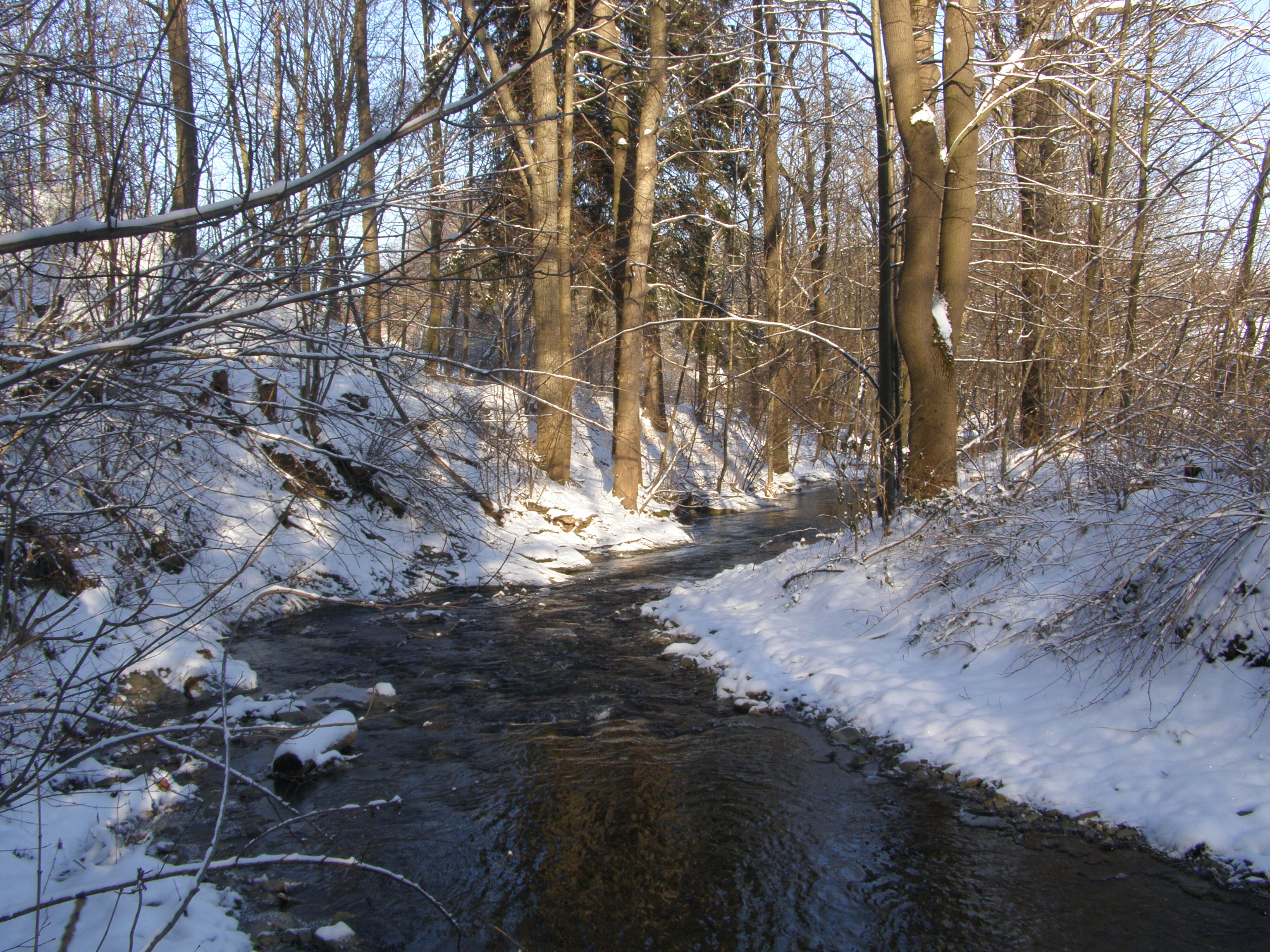 Česky: Metylovická pahorkatina, horní tok potoku Olešná (nad soutokem s potokem Žlabov)